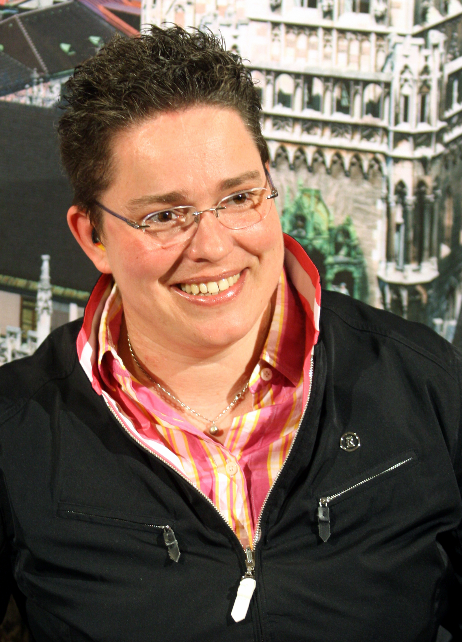 Birgit Kober im Alten Rathaus München, kurz vor Beginn der Sportlerehrung der Landeshauptstadt München, bei der auch Birgit Kober geehrt wurde.